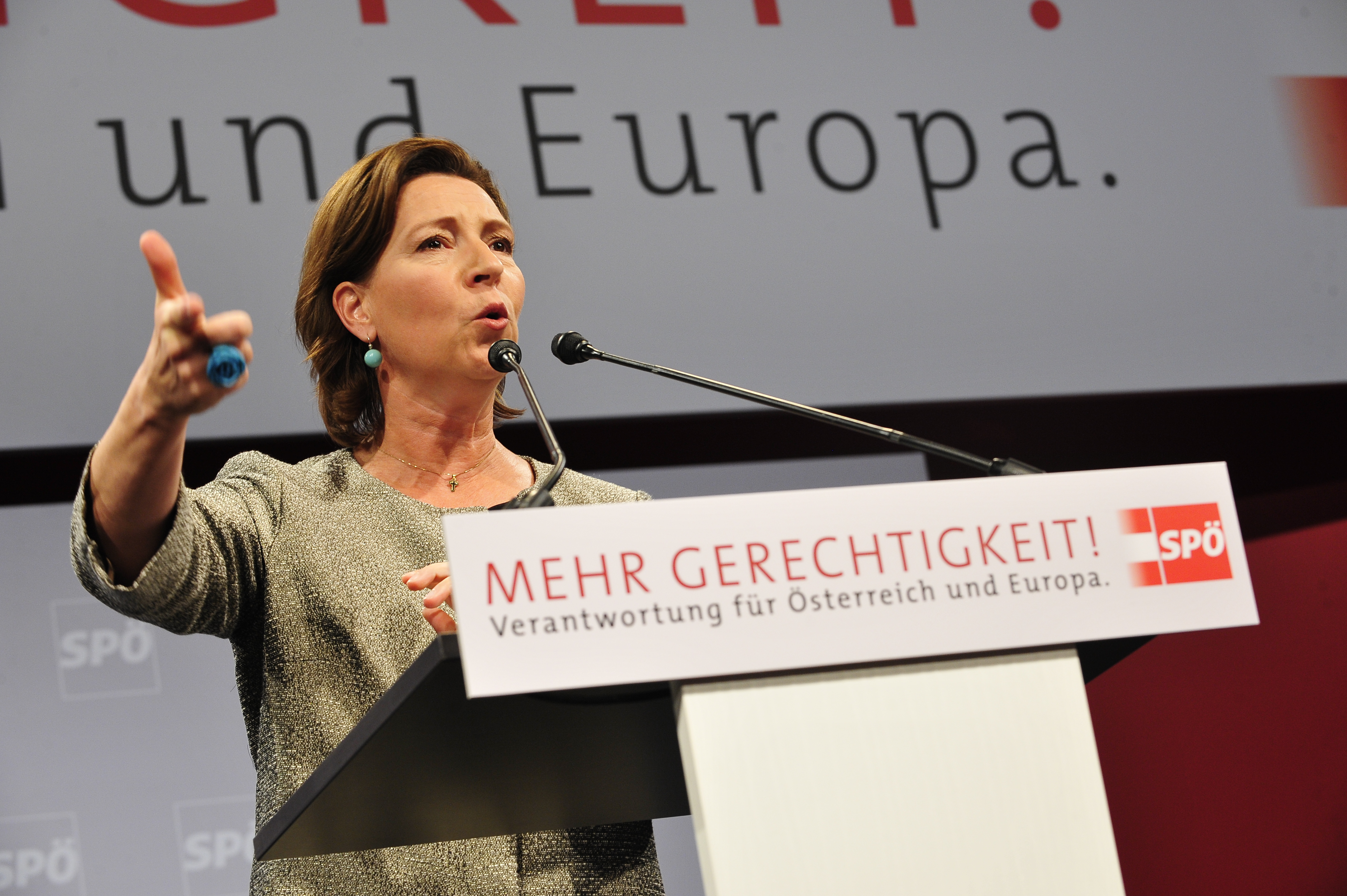 Gabriele Heinisch-Hosek am SPÖ-Bundesparteitag 2012. 13.10.2012 - VAZ St..Pölten